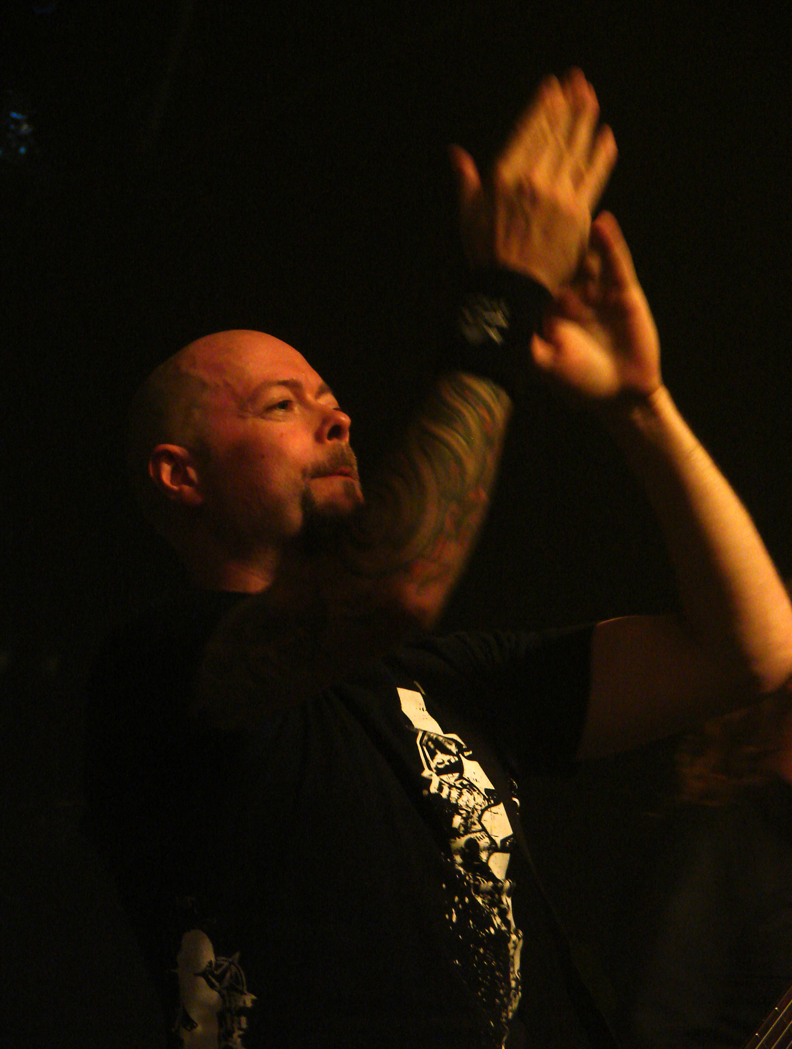 Dark Tranquillity, concert du 12/10/07 à la Locomotive à Paris. Michael Nicklasson.